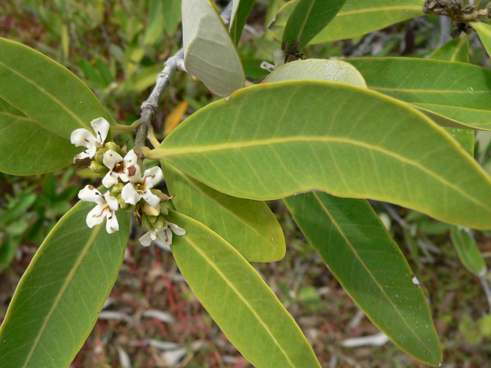 Avicennia germinans, fleurs